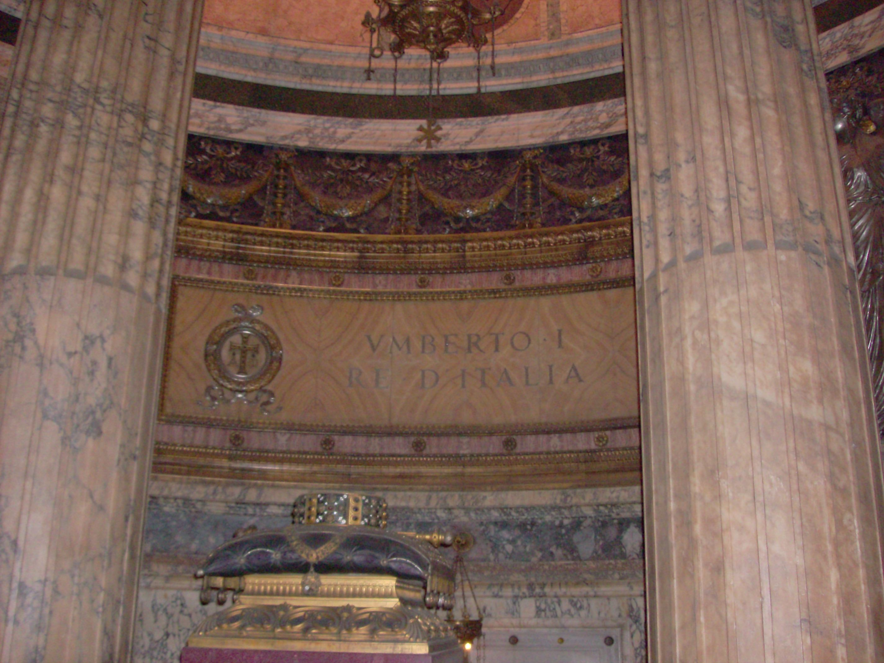 Tomba di Umberto I di Savoia nel Pantheon a Roma